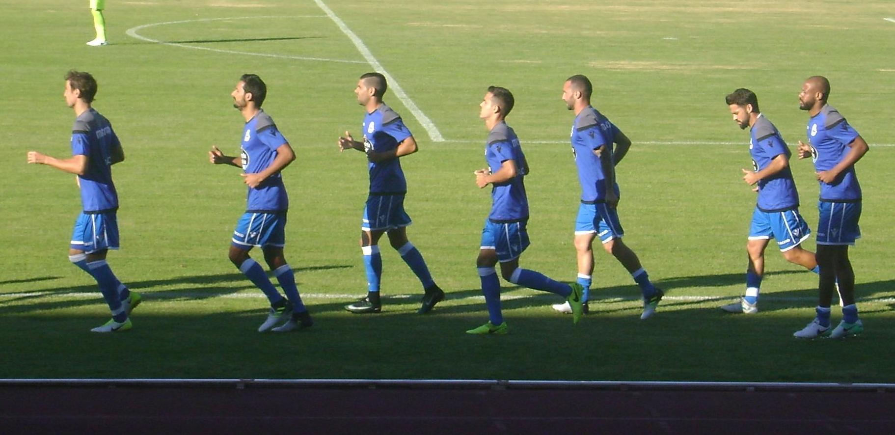 Jugadores del Deportivo